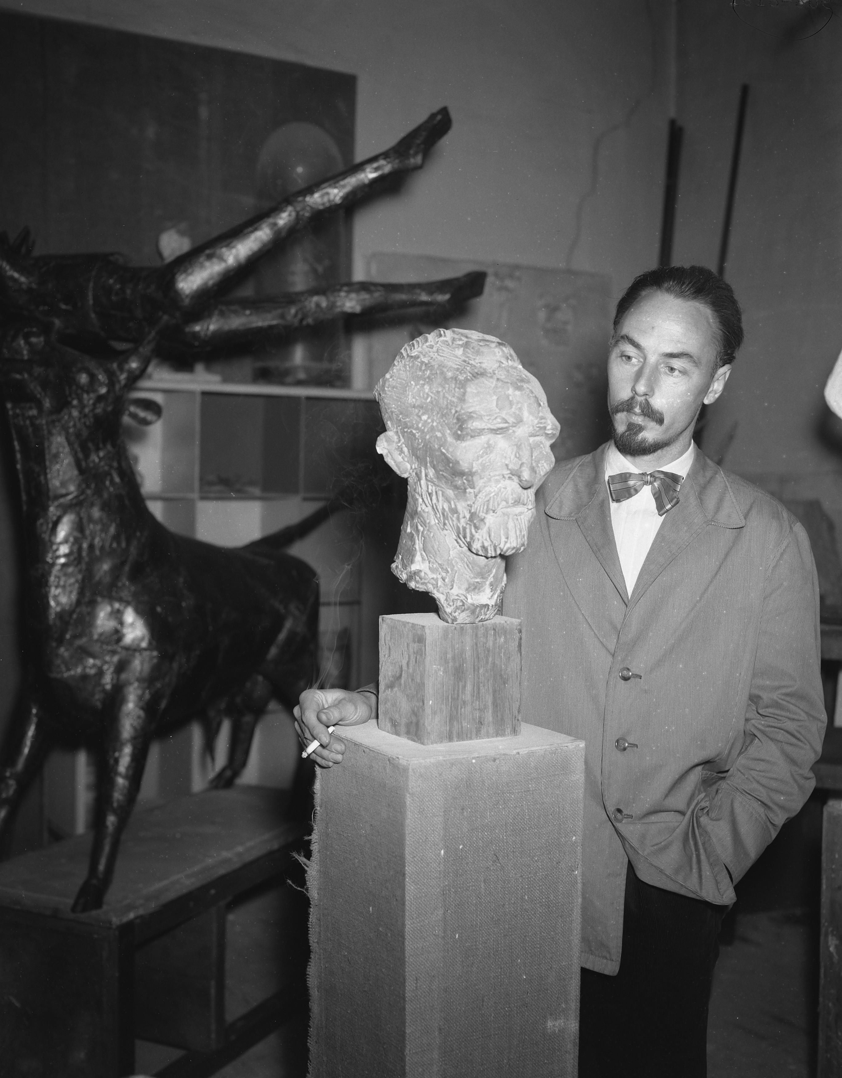 Beeldhouwer André Schaller in zijn atelier in Amstelveen (1957)